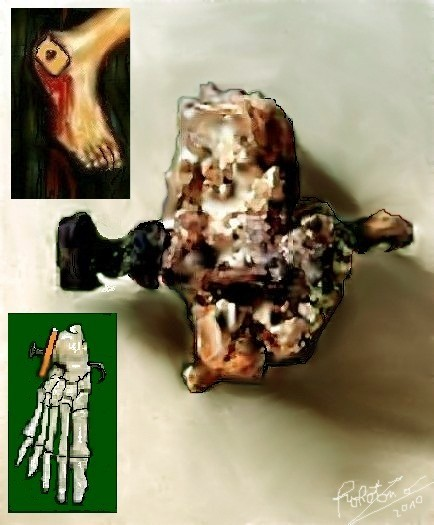 Este hueso calcáreo de un hombre de hace 2000 años, encontrado en 1968, presenta huellas de crucifixión.